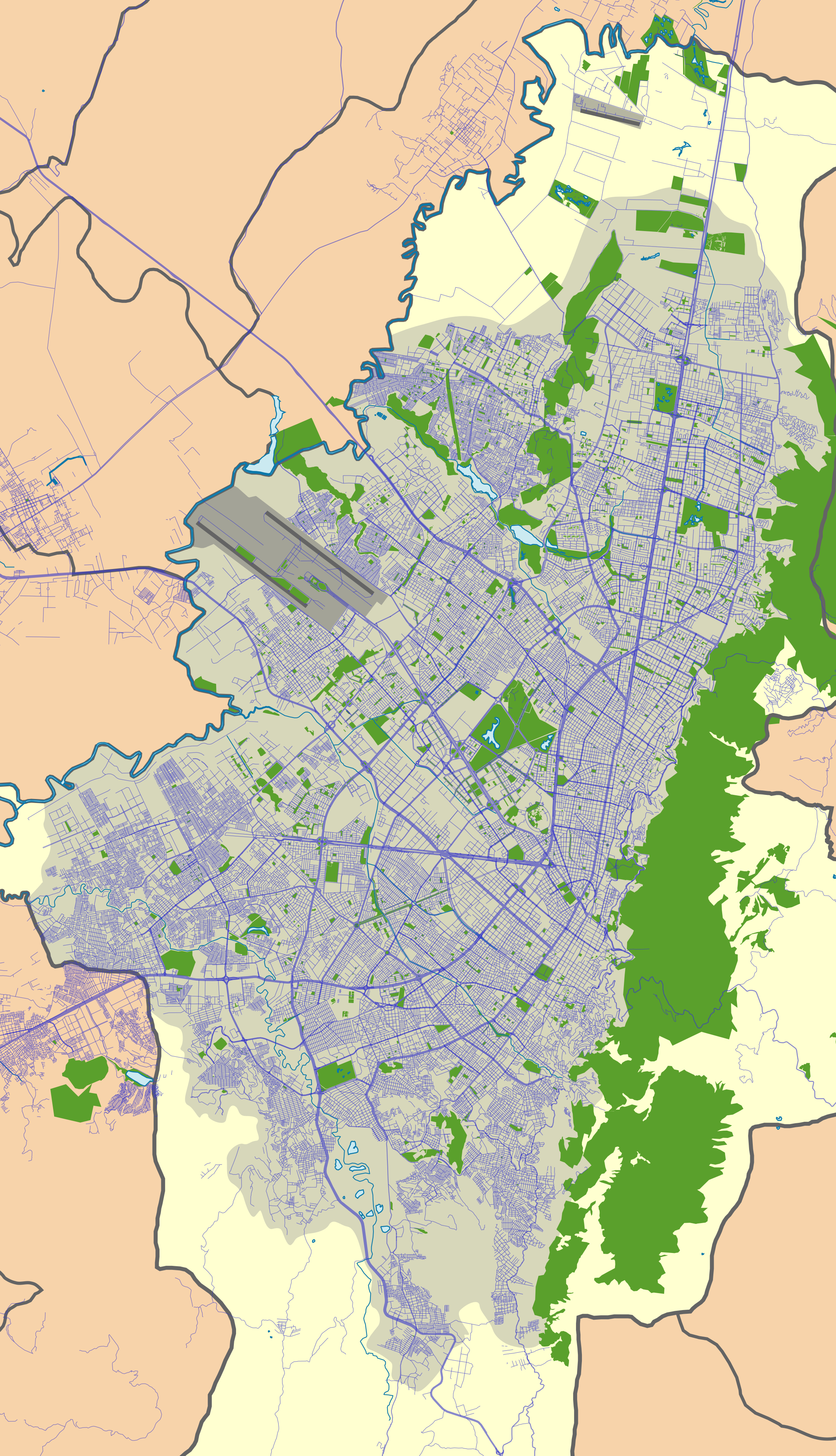 Mapa localizador de la ciudad de Bogotá, Distrito Capital, Colombia. Equirectangular projection. Geographic limits of the map: N: 4.8399 N S: 4.4751 S W: -74.2181 W E: -74.0108 W